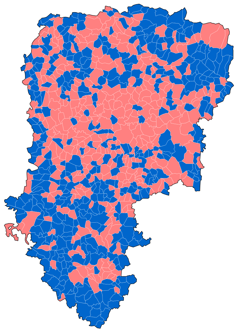 Résultat 2012